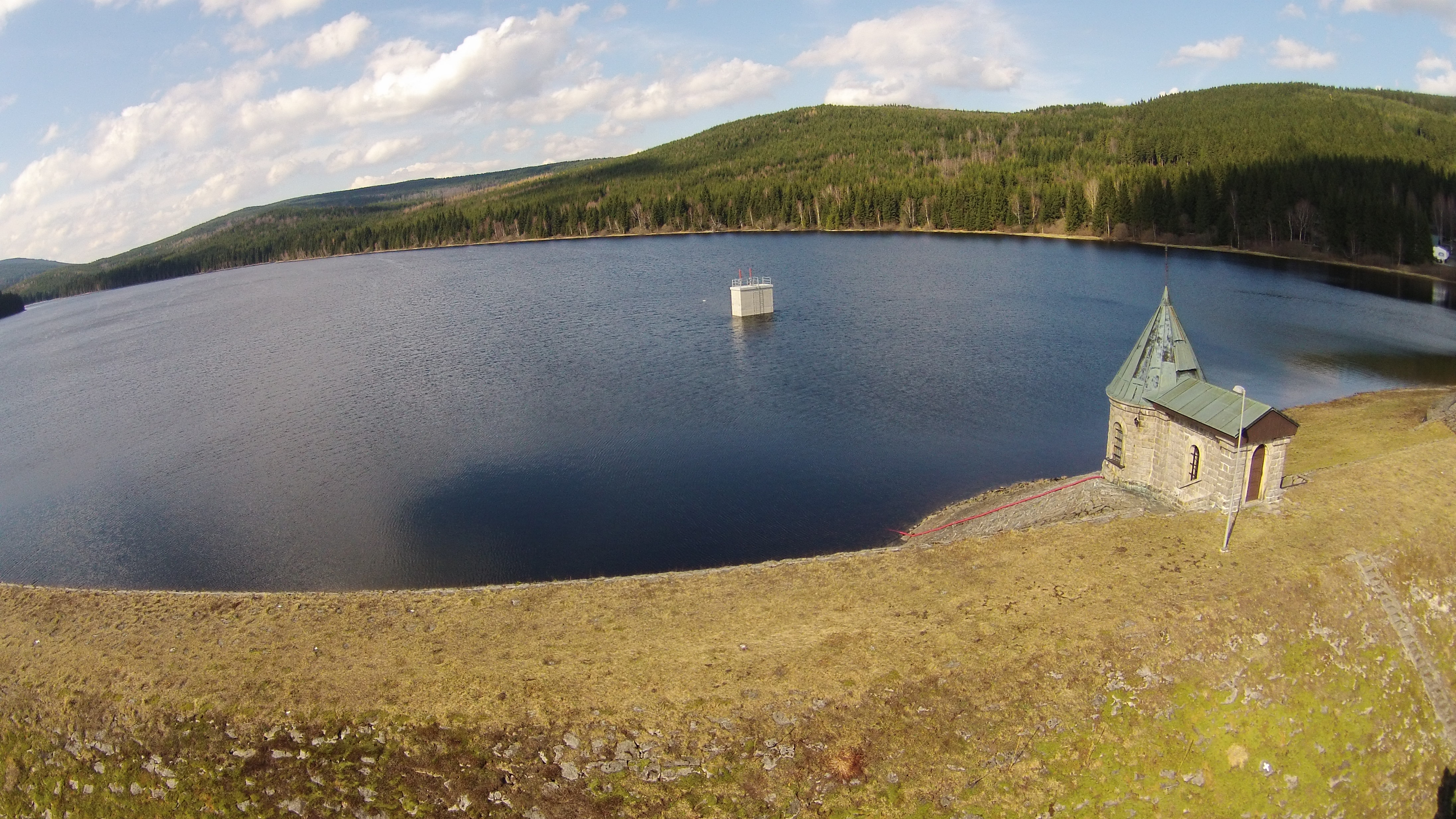 přehradní nádrž Souš ze vzduchu